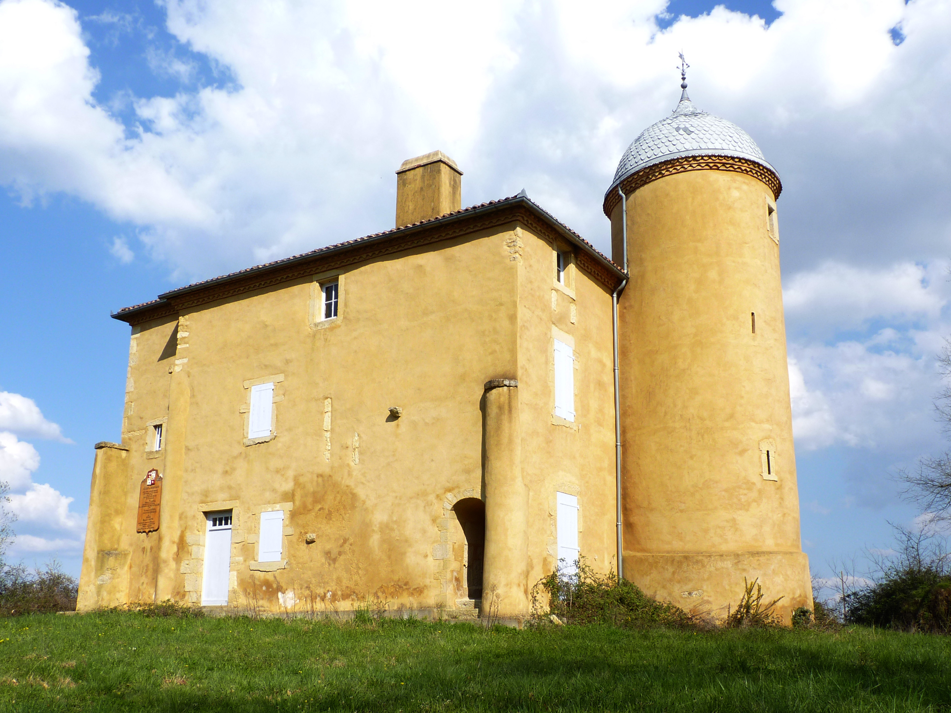 Château de Boucosse